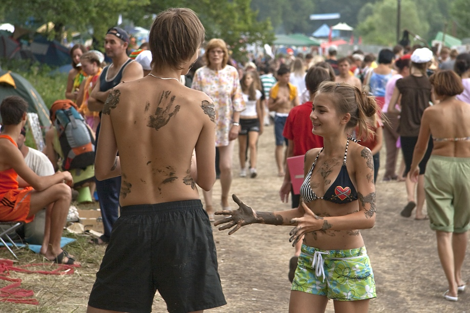 Грушинский фестиваль, Самарская область, Россия